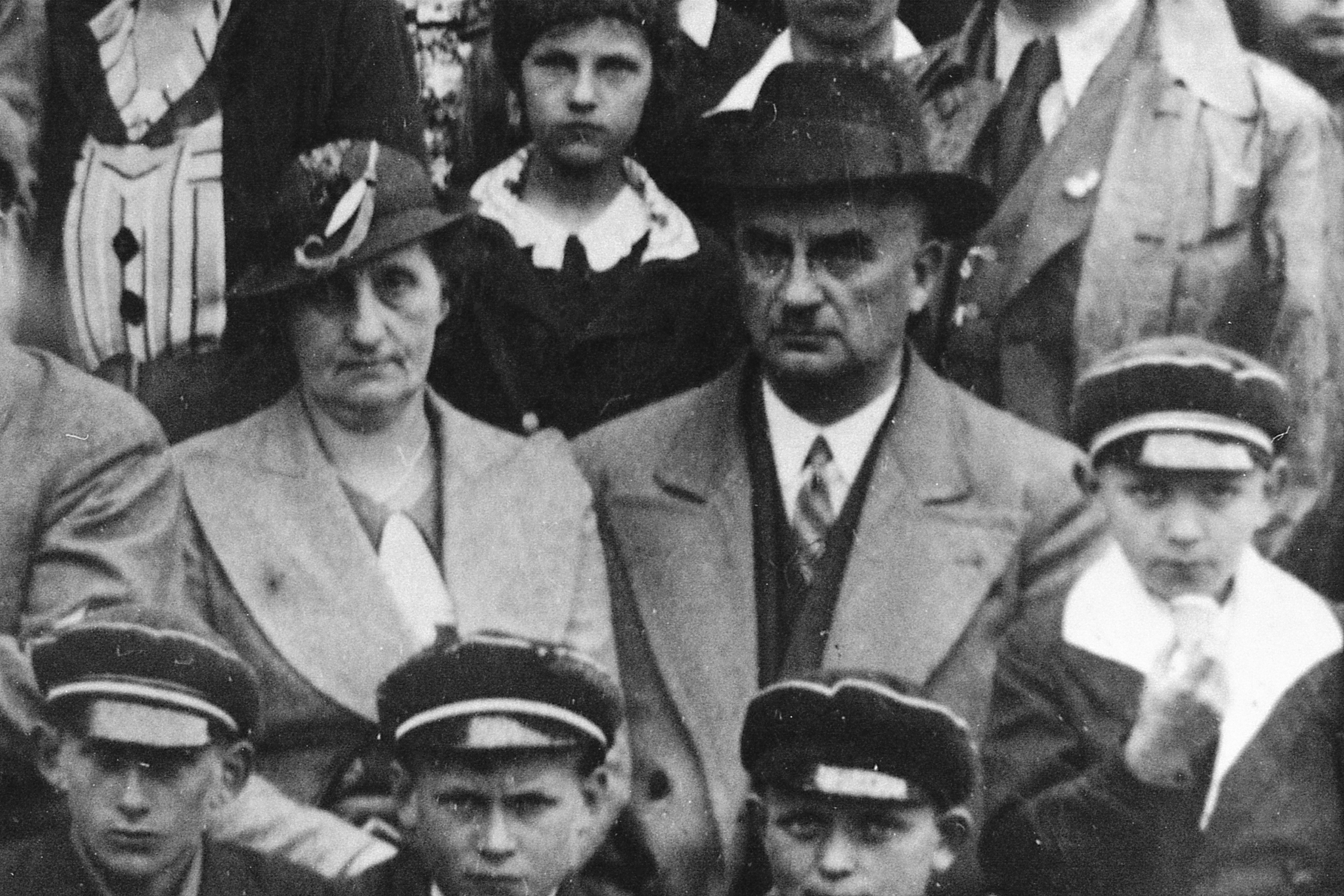 Juliusz Zieliński (1881-1944), działacz Związku Polaków w Niemczech, dyrektor szkoły polskiej w Złotowie, w otoczeniu uczniów podczas wycieczki szkolnej do Wieliczki; obok niego jego żona Maria